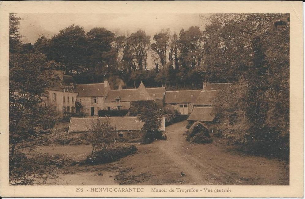 Carte postale du manoir de Trogriffon, situé à Henvic, dans le Finistère, en Bretagne.